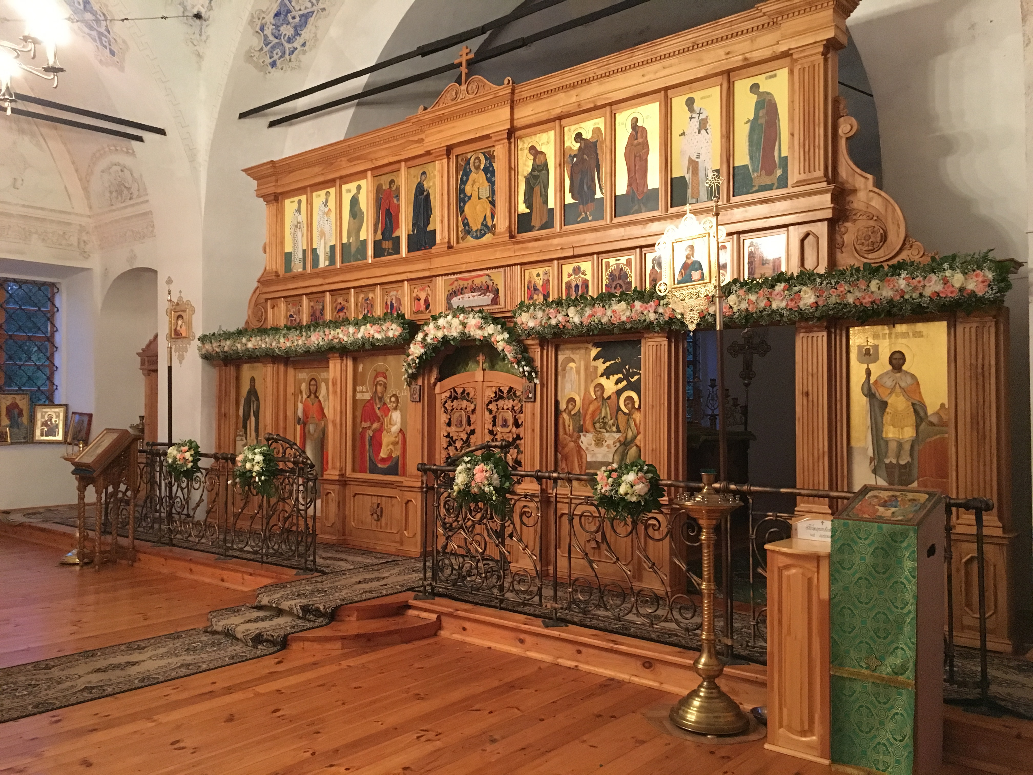 Иконостас храма Святой Троицы деревня Никандрово